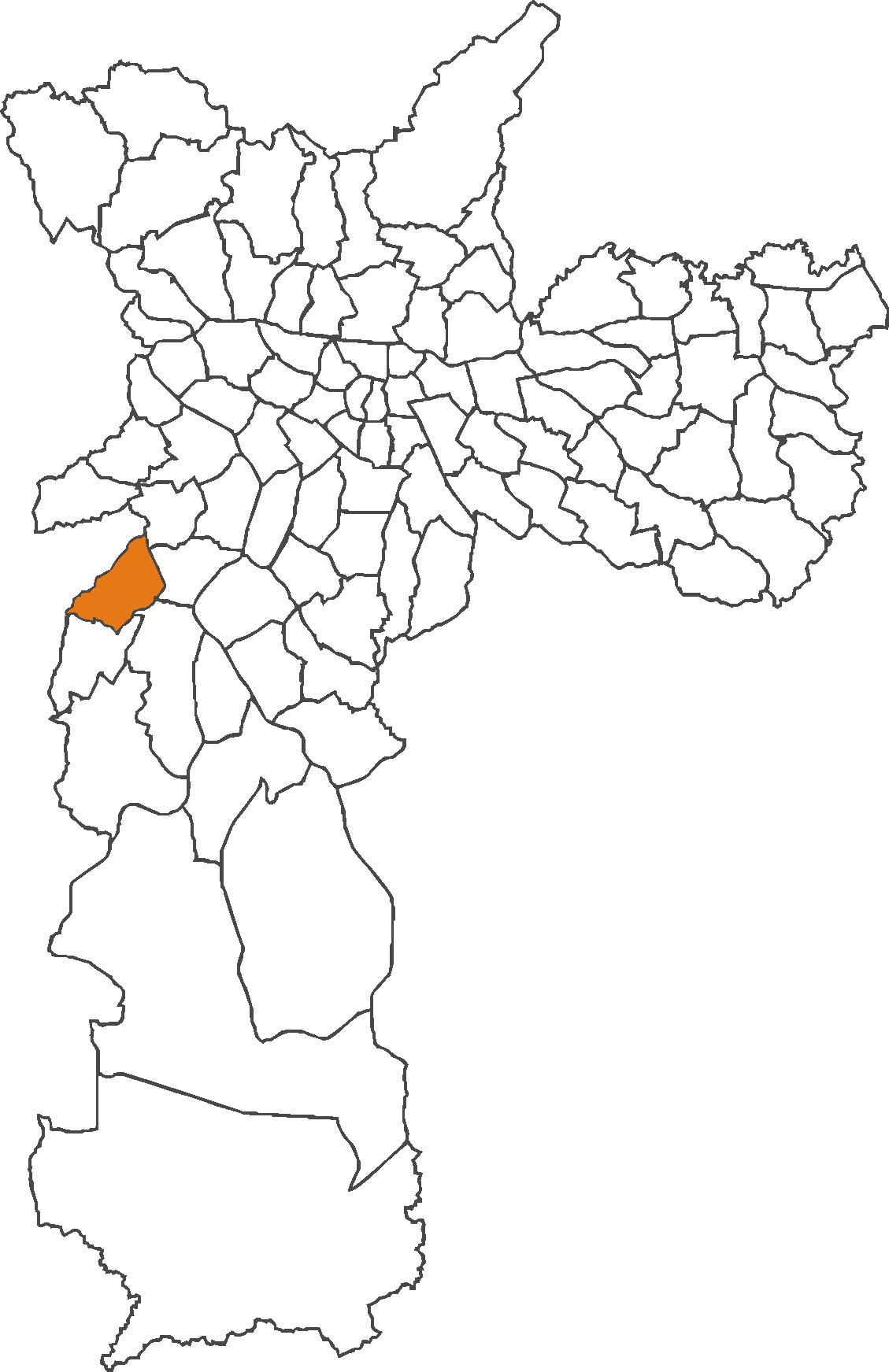 Localização do distrito do Campo Limpo no município de São Paulo.